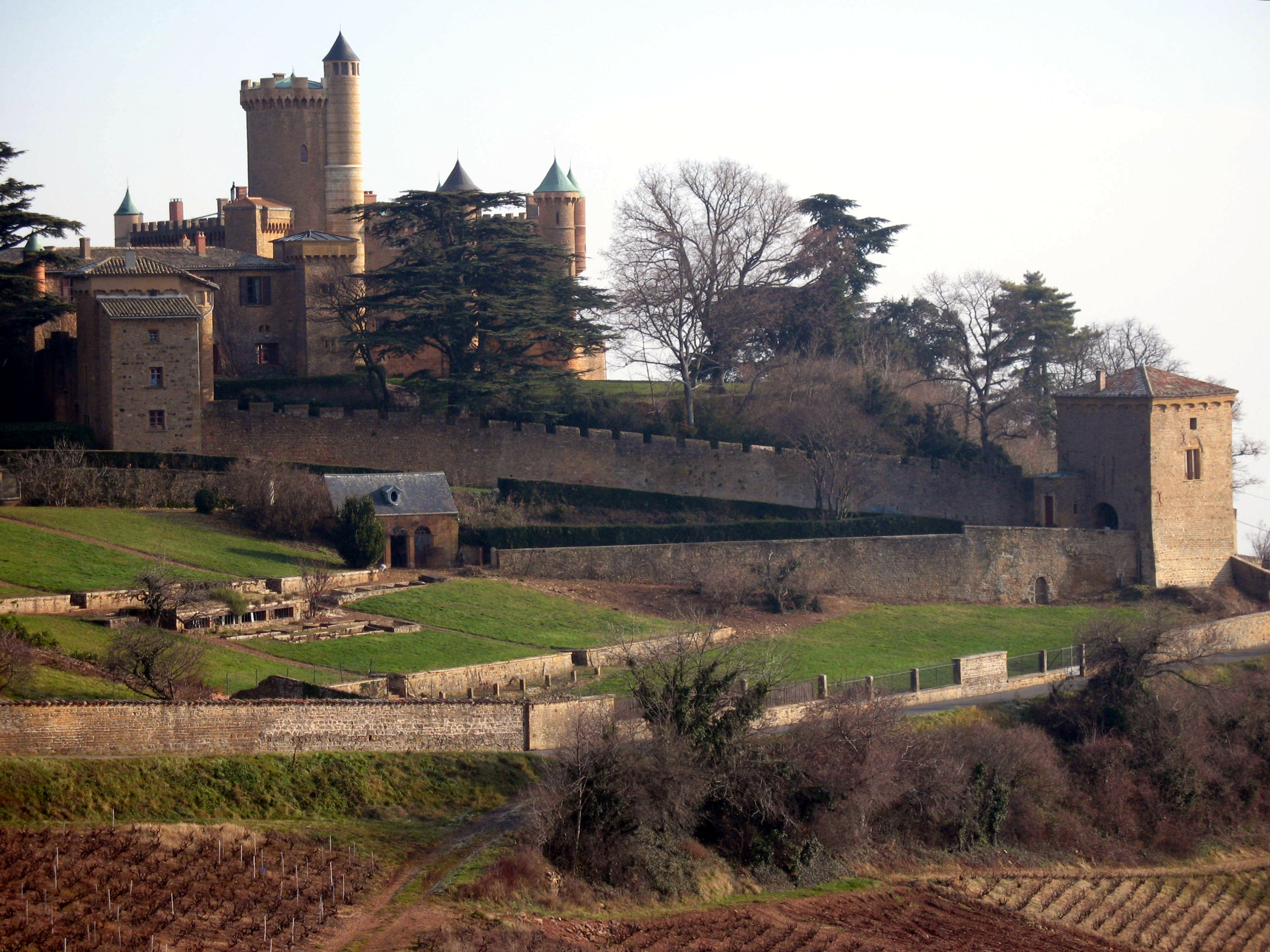 Château de Montmelas, dans le Rhône